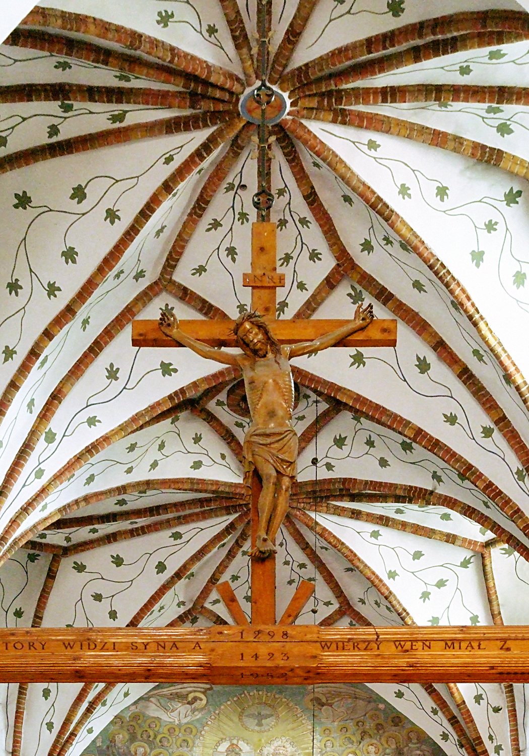 Szamotuły, kolegiata, gotycki krucyfiks z ok. 1300 (Szamotuły - Poland, collegiate, Gothic crucifix, about 1300).